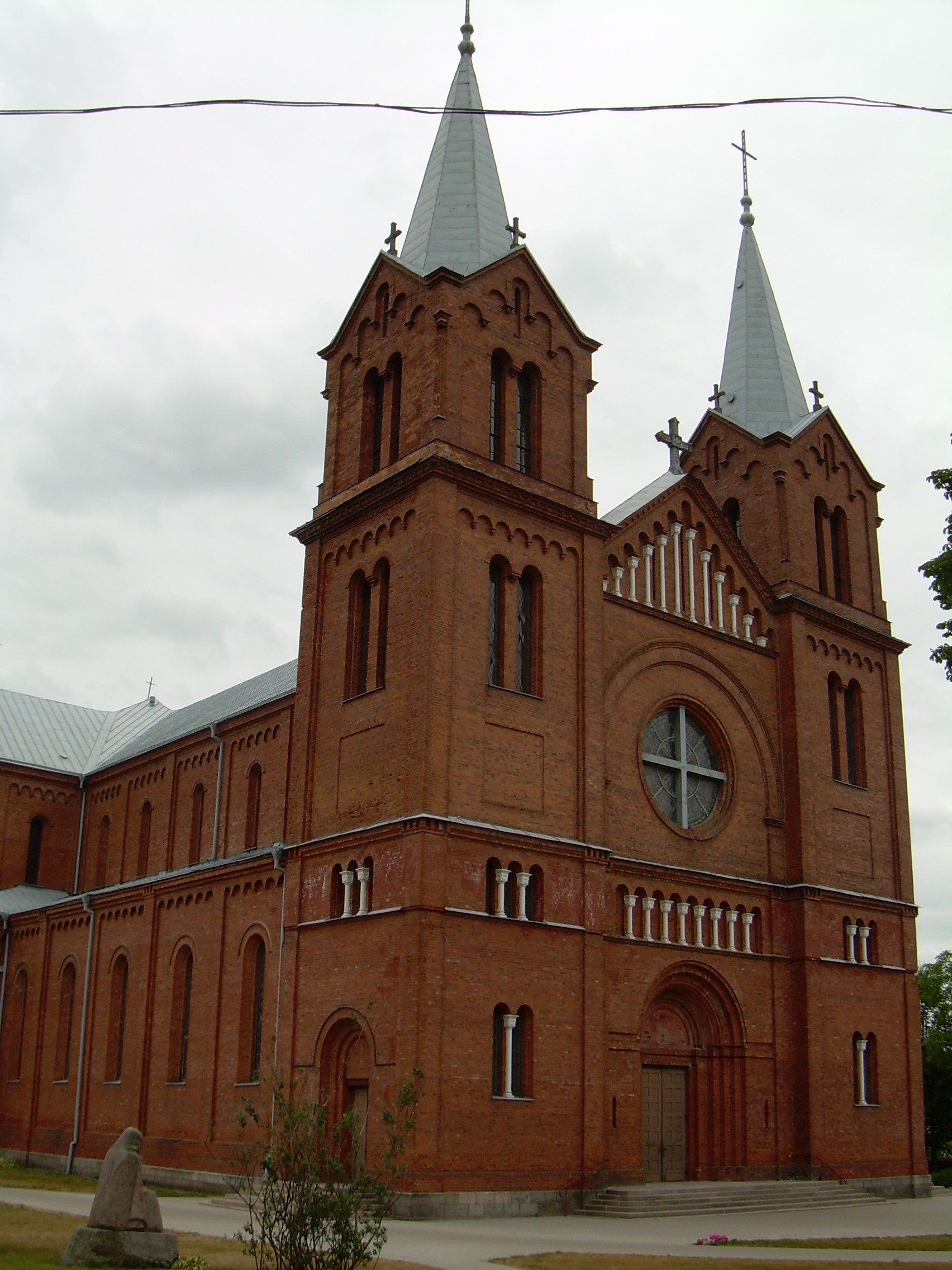 Plungės Šv. Jono Krikštytojo bažnyčia